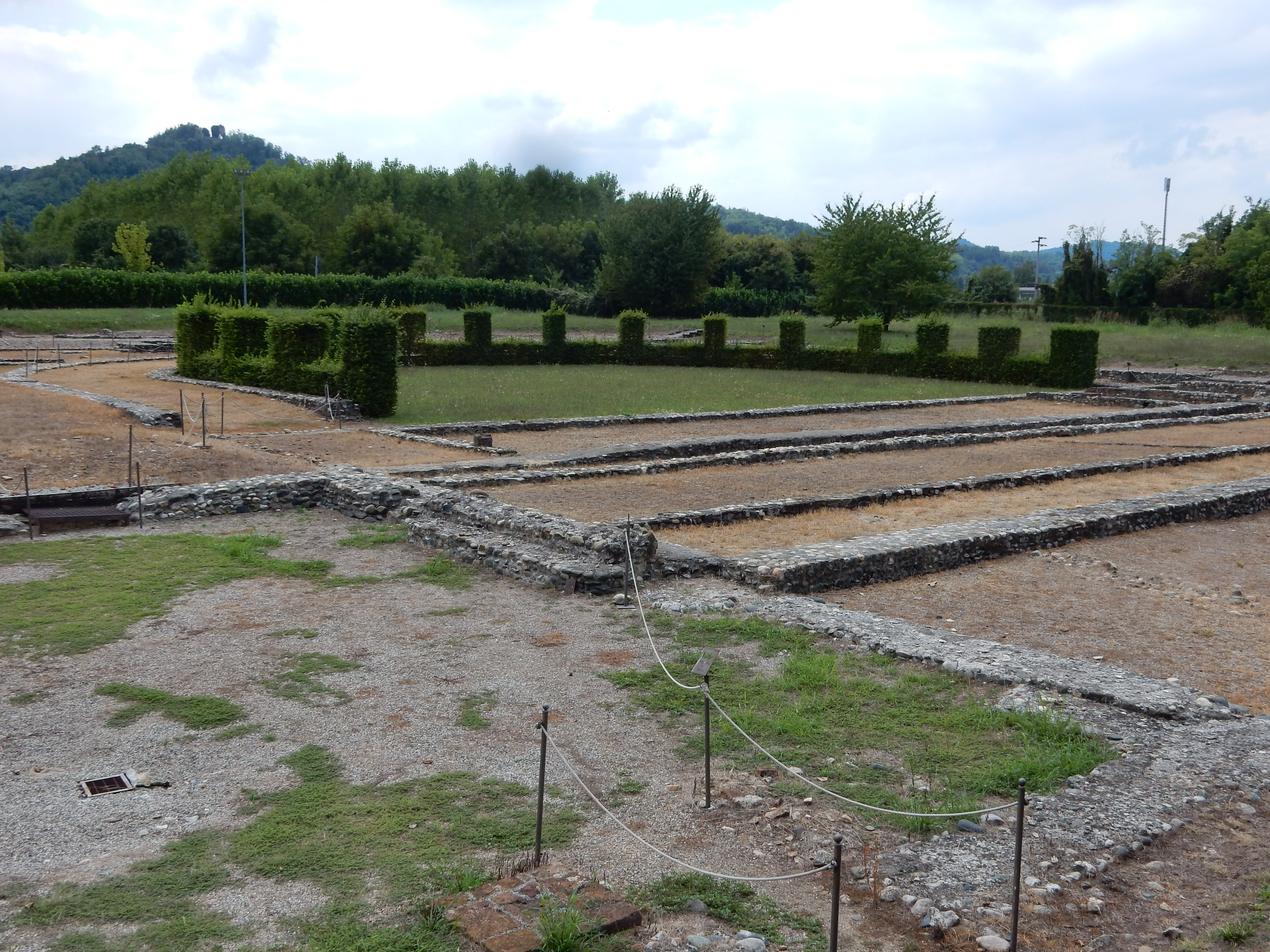 Veduta area archeologica di Industria